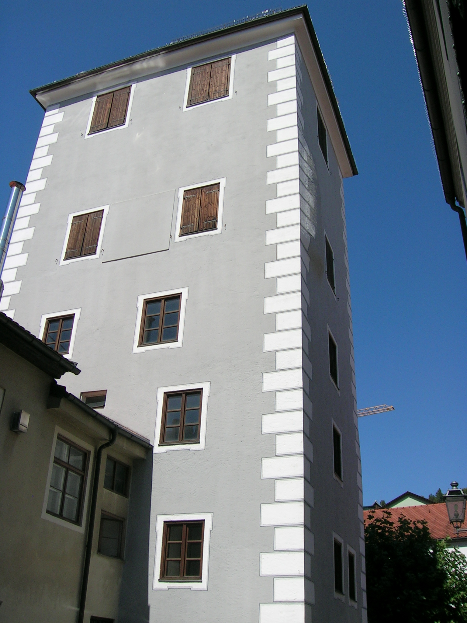 Mittelalterlicher Wohnturm, 13. Jahrhundert, mit barock stuckiertem Turmsaal von 1690.